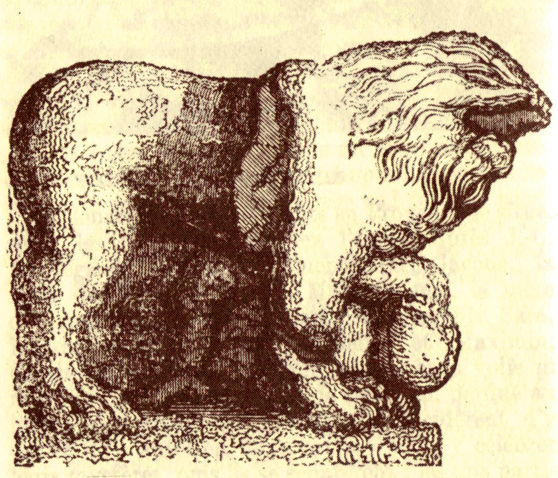 Gravure du XIXe siècle représentant le lion des Saintes-Maries-de-la-Mer